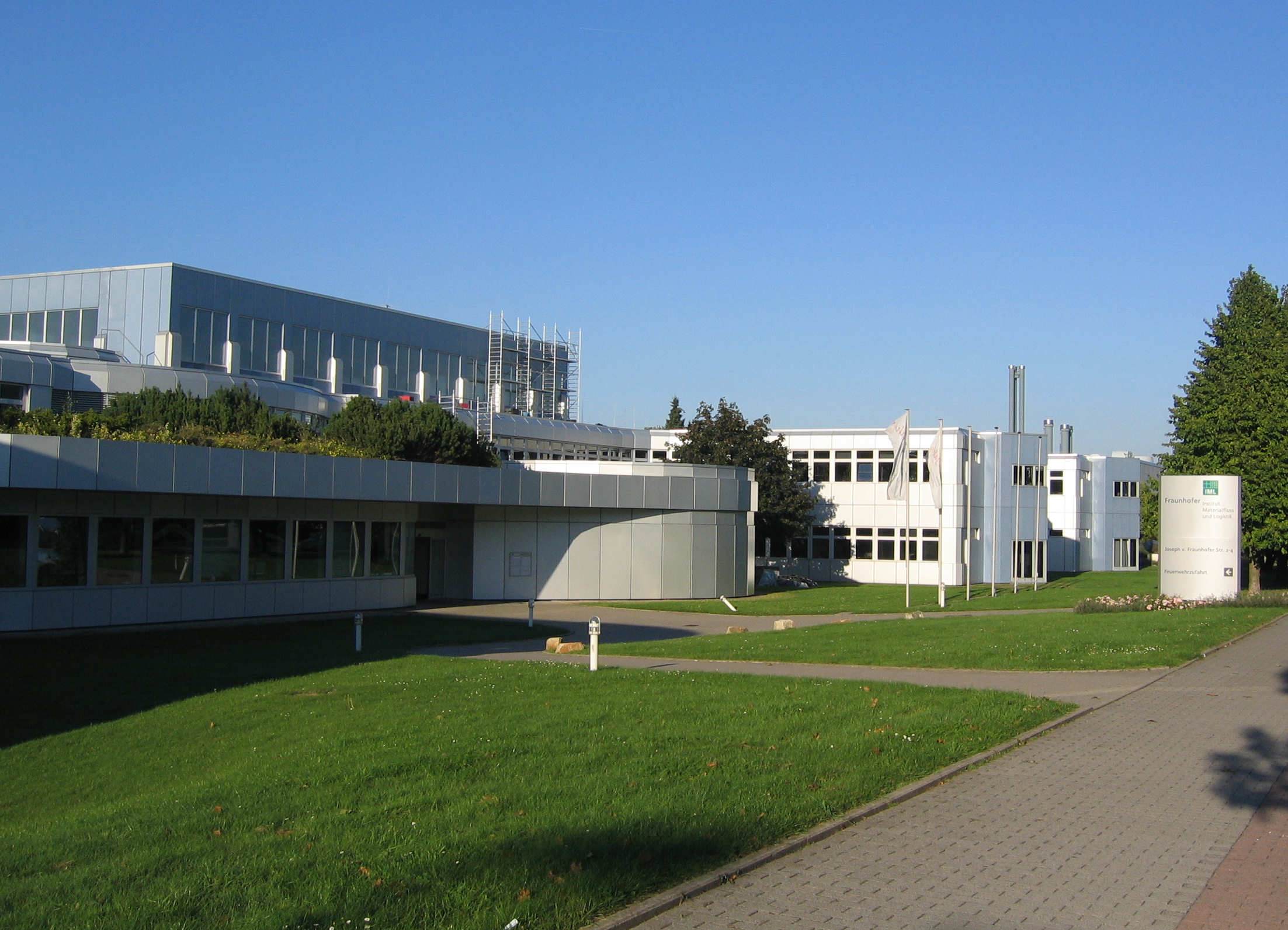 Fraunhofer Institut für Materialfluss und Logistik Dortmund